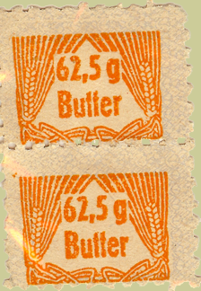 Zwei Reisebuttermarken von Oskar Huth